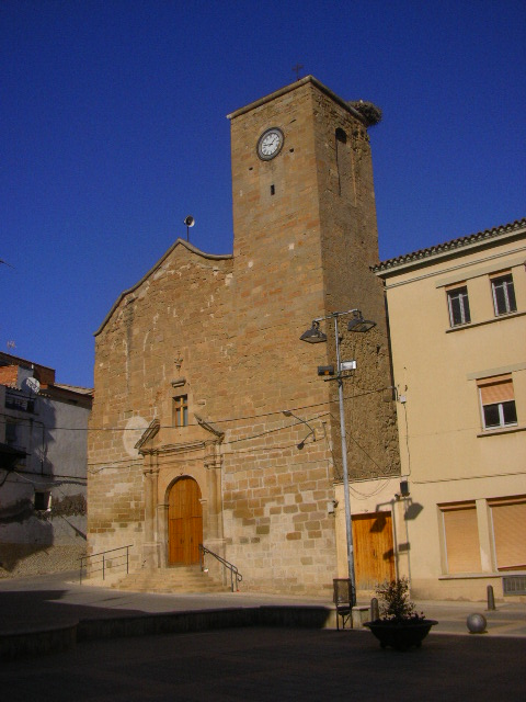 Iglesia parroquial de Soses